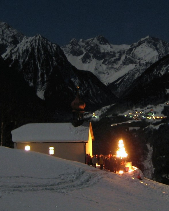 Weihnachtsmette in der Nacht vom 24. auf den 25. Dezember 2007 in der Bergparzelle Laz in Nüziders / Österreich. Im Hintergrund die Gebirgskette des Rätikons mit der Gemeinde Bürserberg